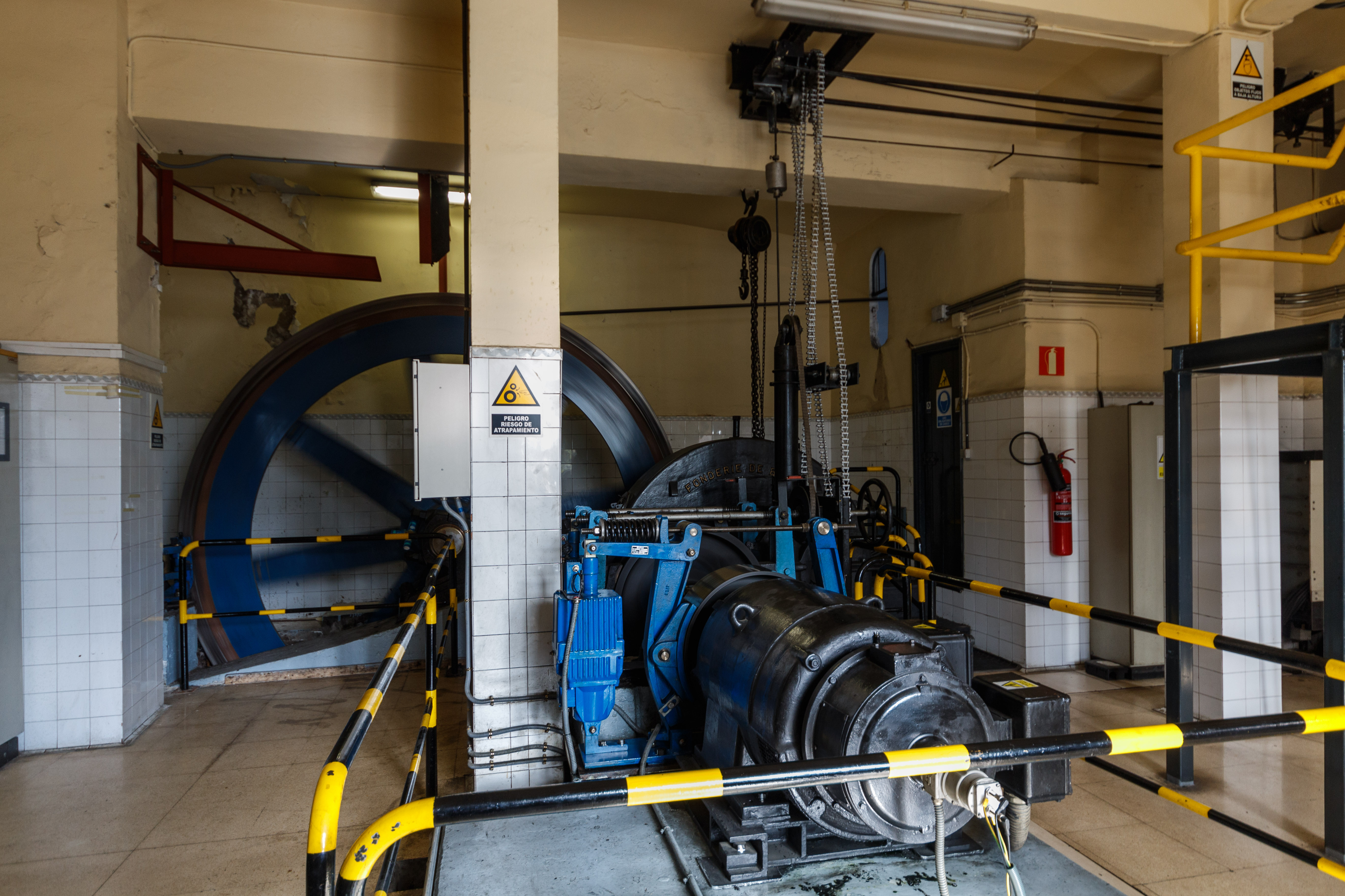 Zugaztietako funikularra